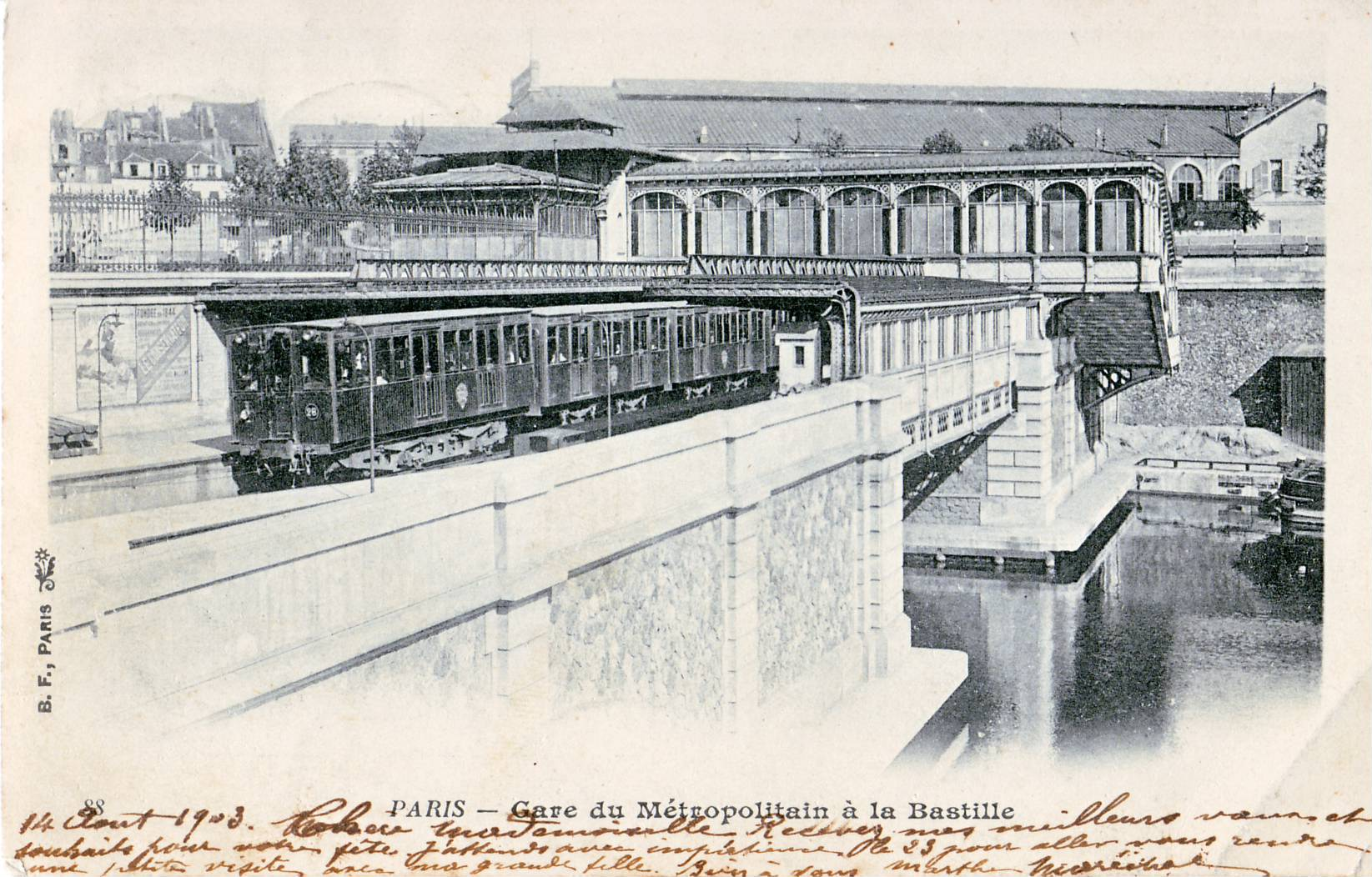 Carte postale ancienne éditée par BF à Paris, N°88 Paris : Gare du Métropolitain à la Bastille. La première motrice est une motrice à unité double (séries M 101 à 144 ou 201 à 233) à 2 moteurs Thomson TH 4 de 125 CV et controleur Thomson double. La station est construite à l'extrémité du Canal Saint-Martin, et on voit sur le cliché le début du Bassin de l'Arsenal. A l'arrière plan se trouve la toiture de la Gare de la Bastille, sur l'emplacement duquel à été depuis construit l'Opéra Bastille